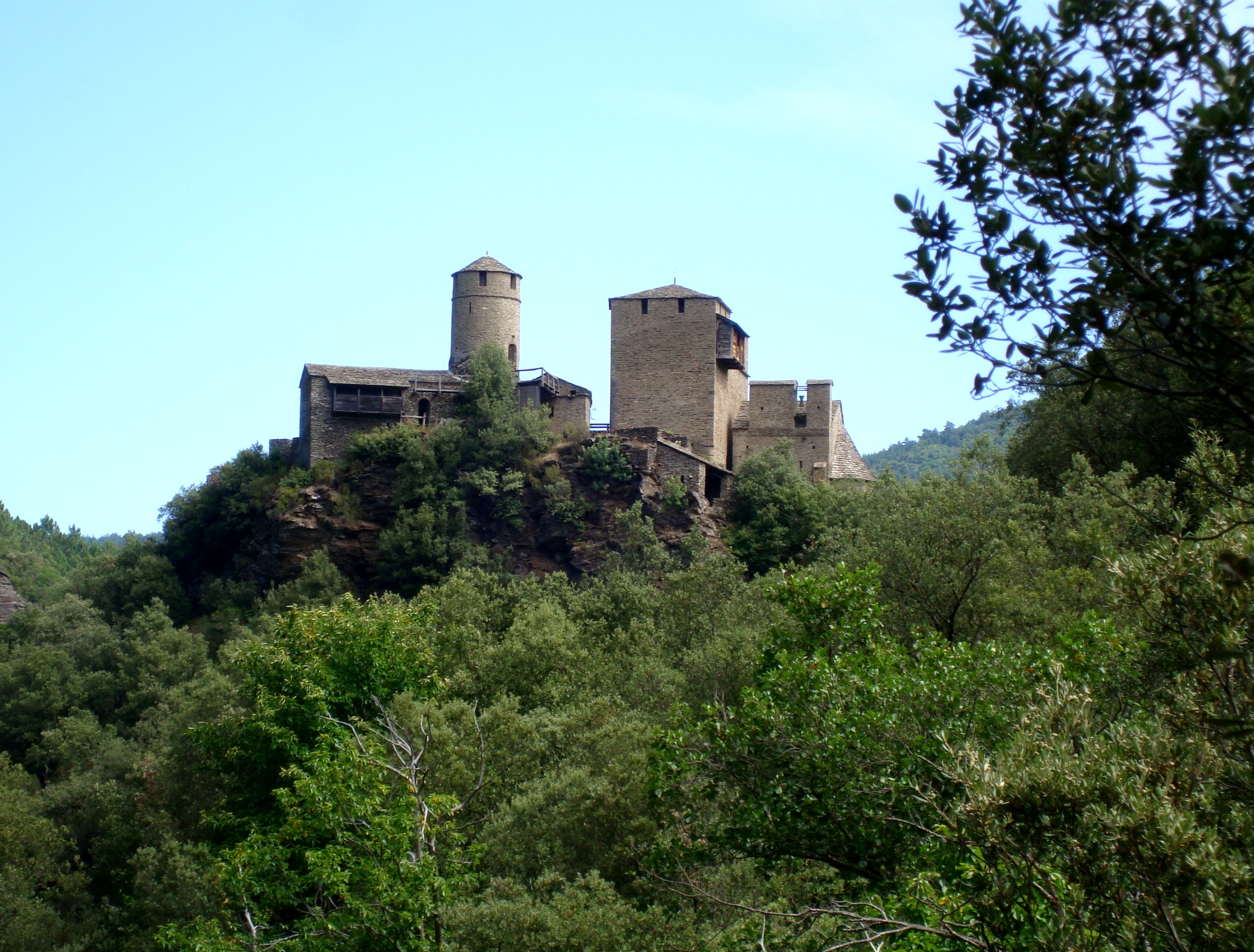 Le château de Calberte à Saint-Germain-de-Calberte en Lozère.